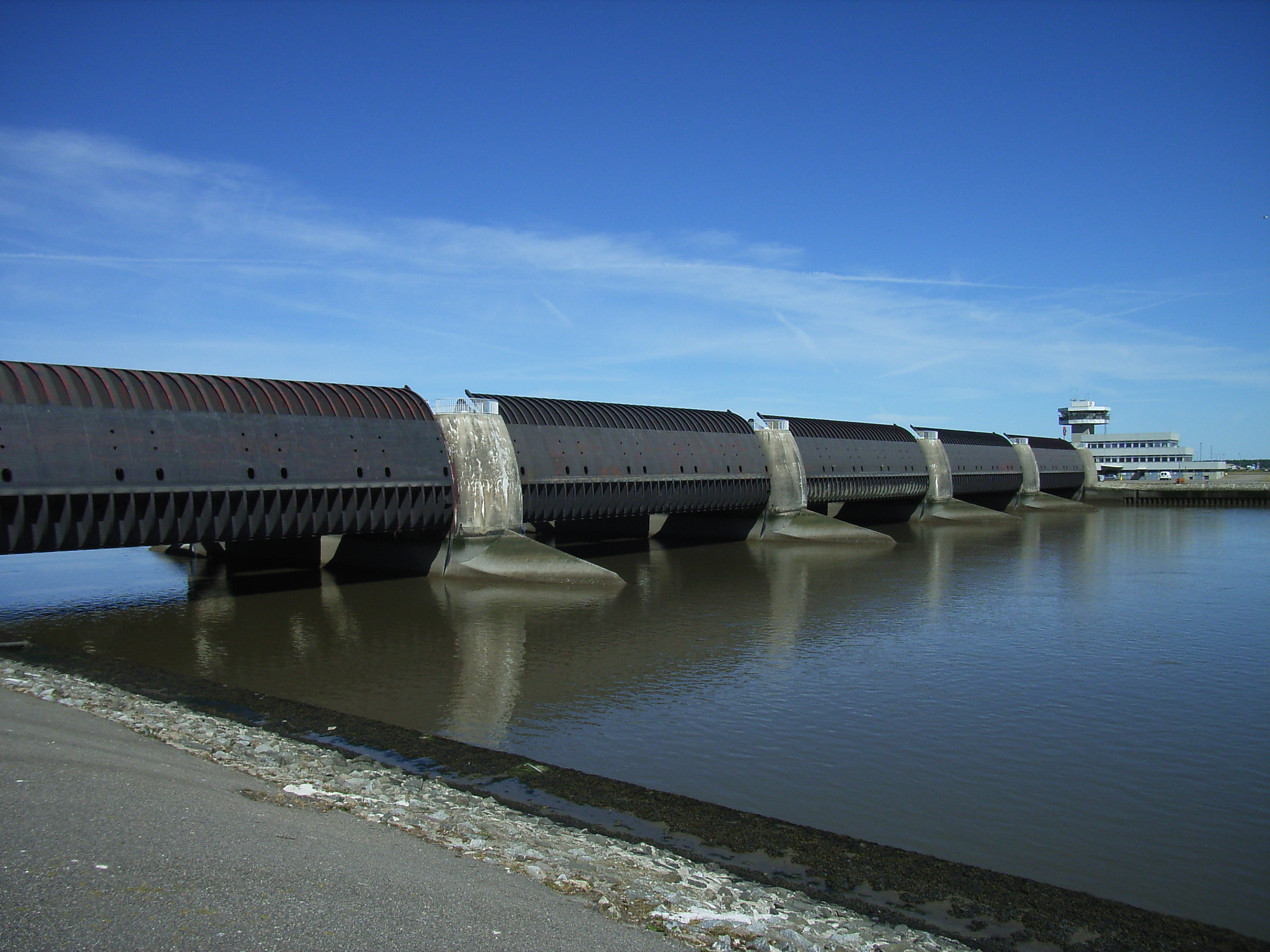 Eidersperrwerk